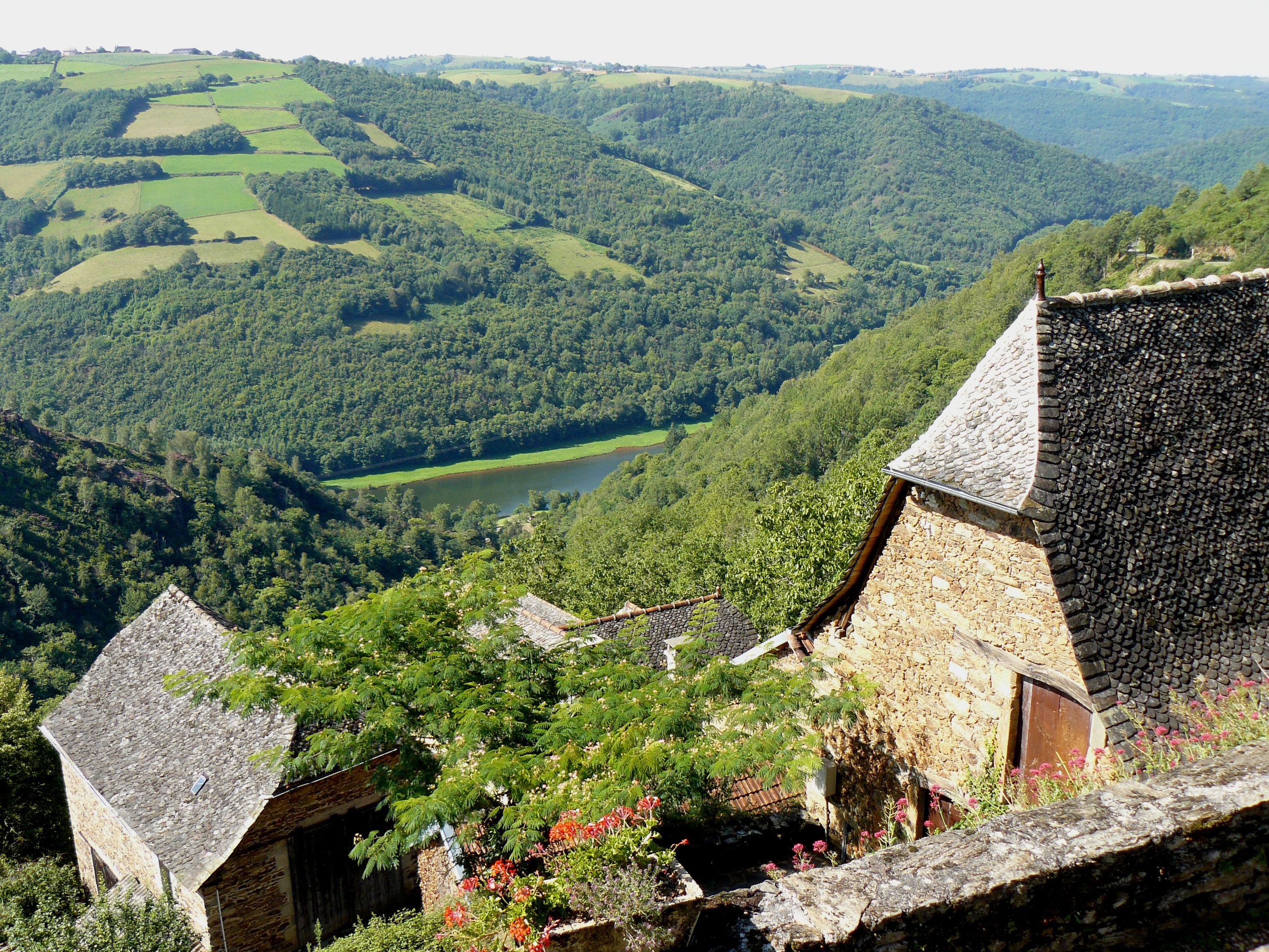 Panorama sur le Lot depuis le hameau de la Vinzelle (comm. de Grand-Vabre, Aveyron).